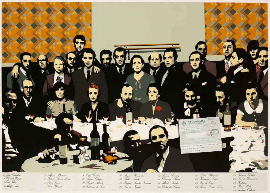 Serigrafía sobre papel Arches 73 x 105 cm